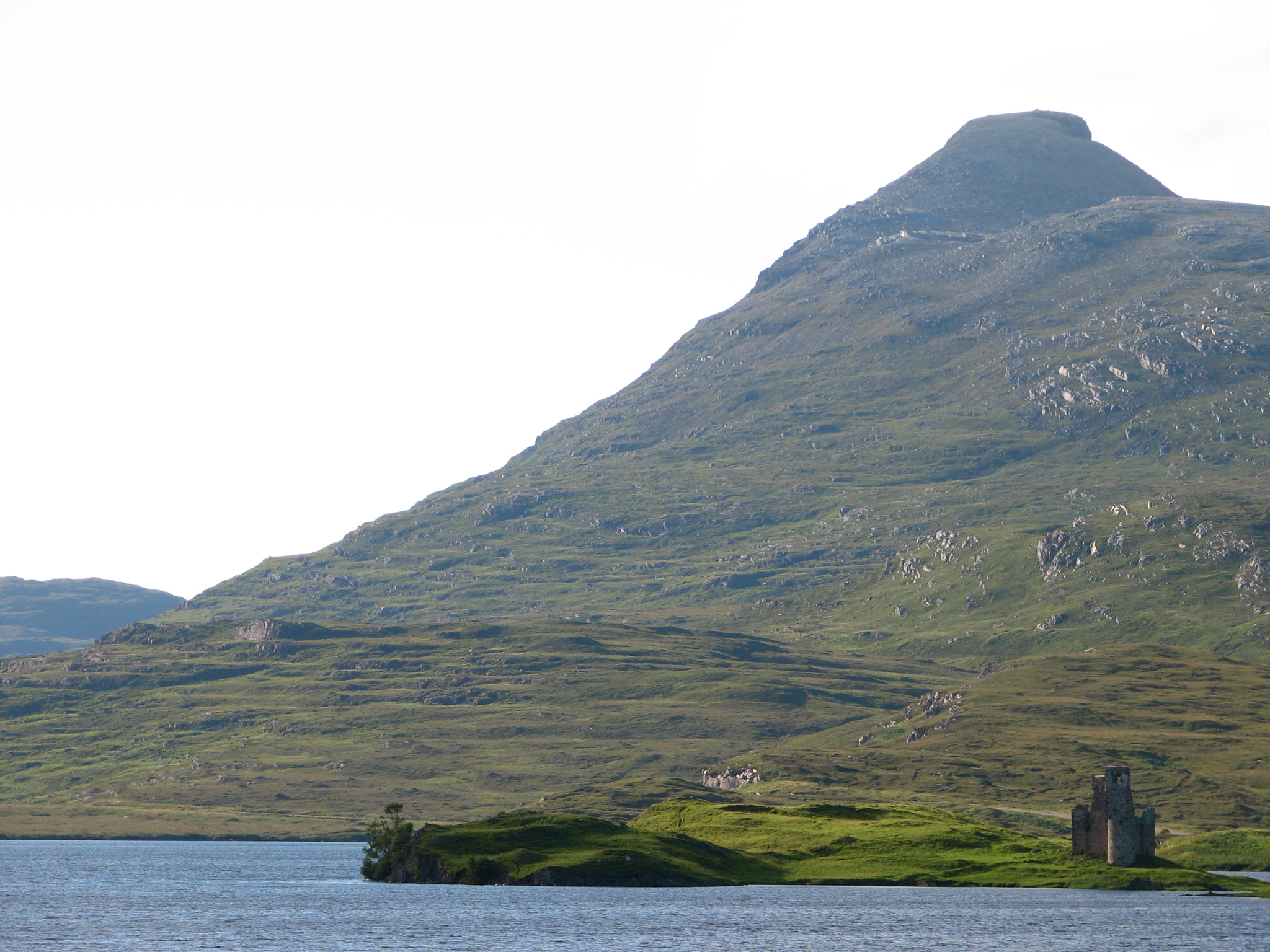 Loch Assynt et Ardvreck Castle